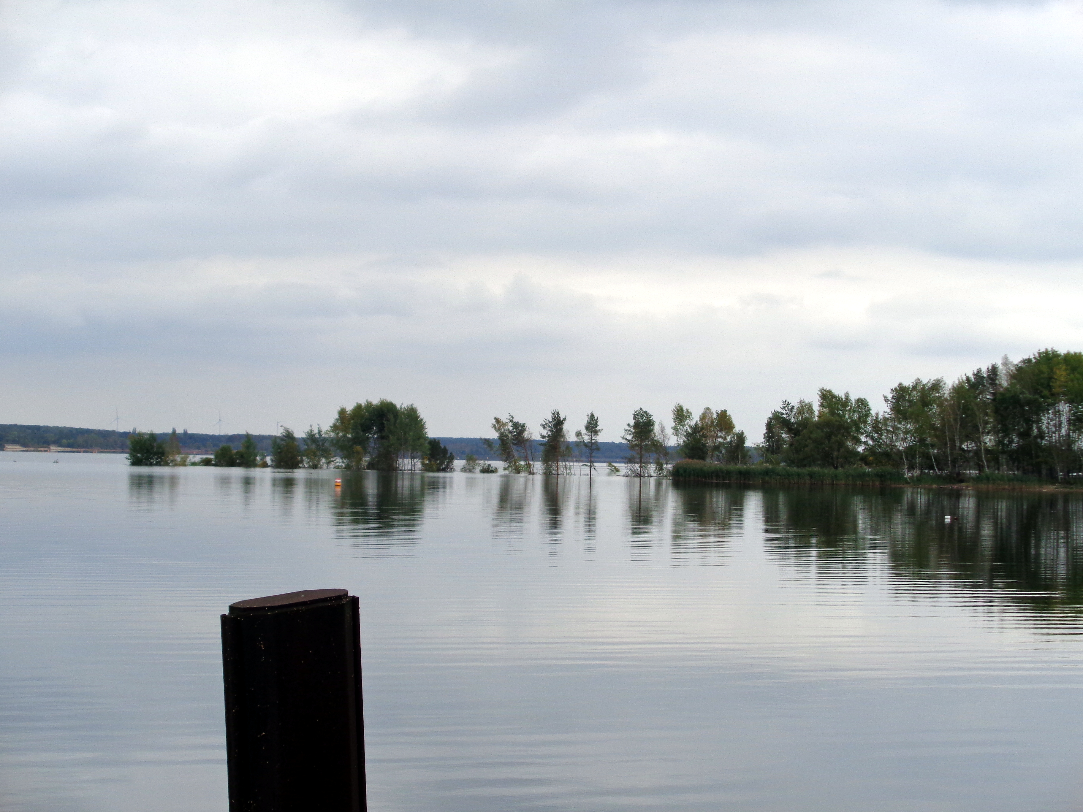 Rutschung von Teilen der Insel im Senftenberger See vom 13. September 2018. Aufgenommen am 14. September 2018 von der Anlegestelle in Niemtsch